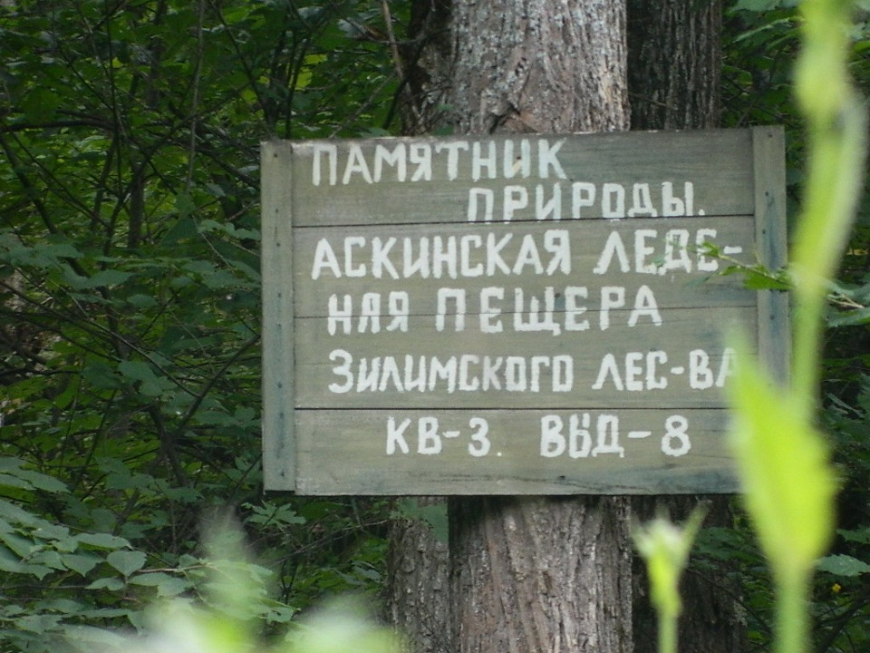 А́скинская пеще́ра — крупная полость Южного Урала мешкообразного типа. Является памятником природы всероссийского значения. С 2017 года вход в пещеру ограничен, пещера была передана в аренду Русскому географическому обществу для восстановления микроклимата и сохранения ледниковых реликтов